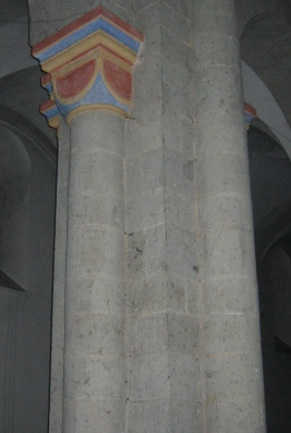 Halbsäule an einem Pfeiler